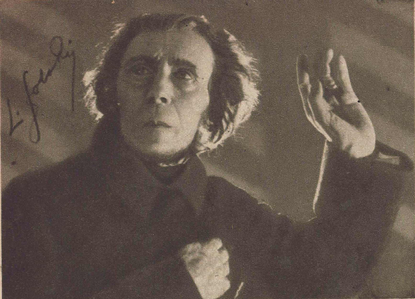 Ludwik Solski jako Mickiewicz w sztuce "Legion", z filmu Geniusz sceny